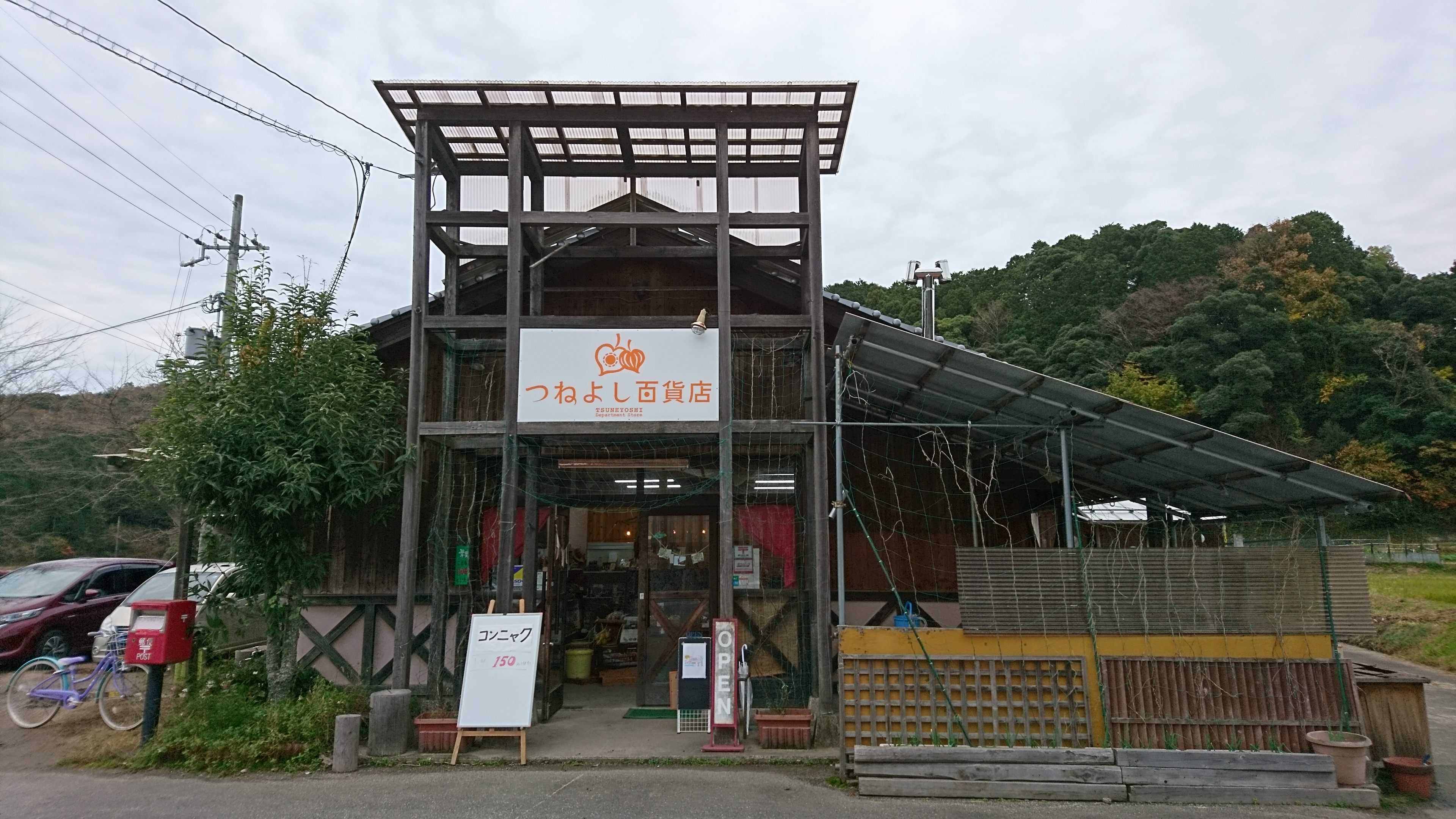 京丹後市大宮町にある「チャレンジ！つねよし百貨店」の外観